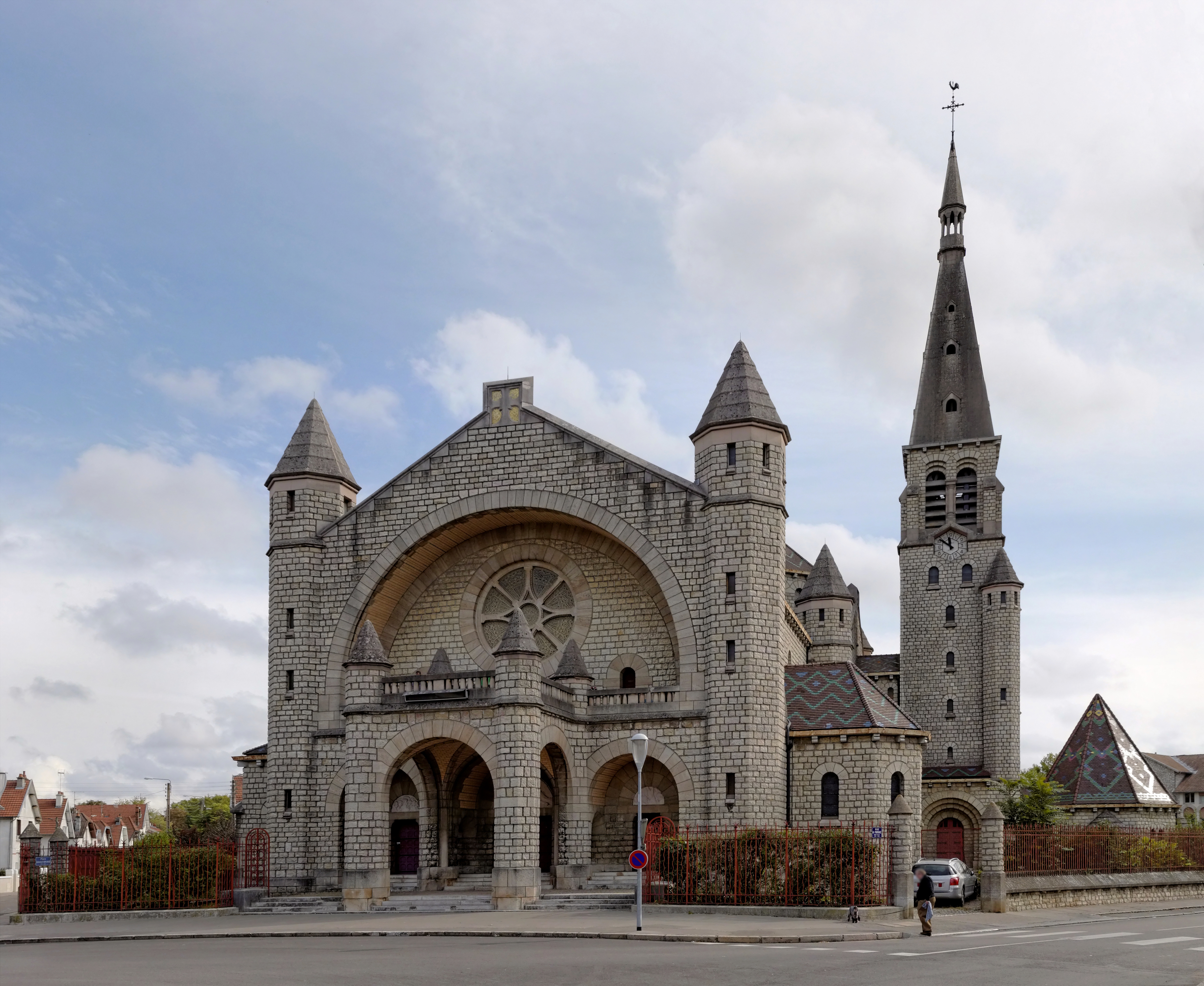 Église du Sacré-Cœur, (Dijon, Côte d'Or, Bourgogne, France). .